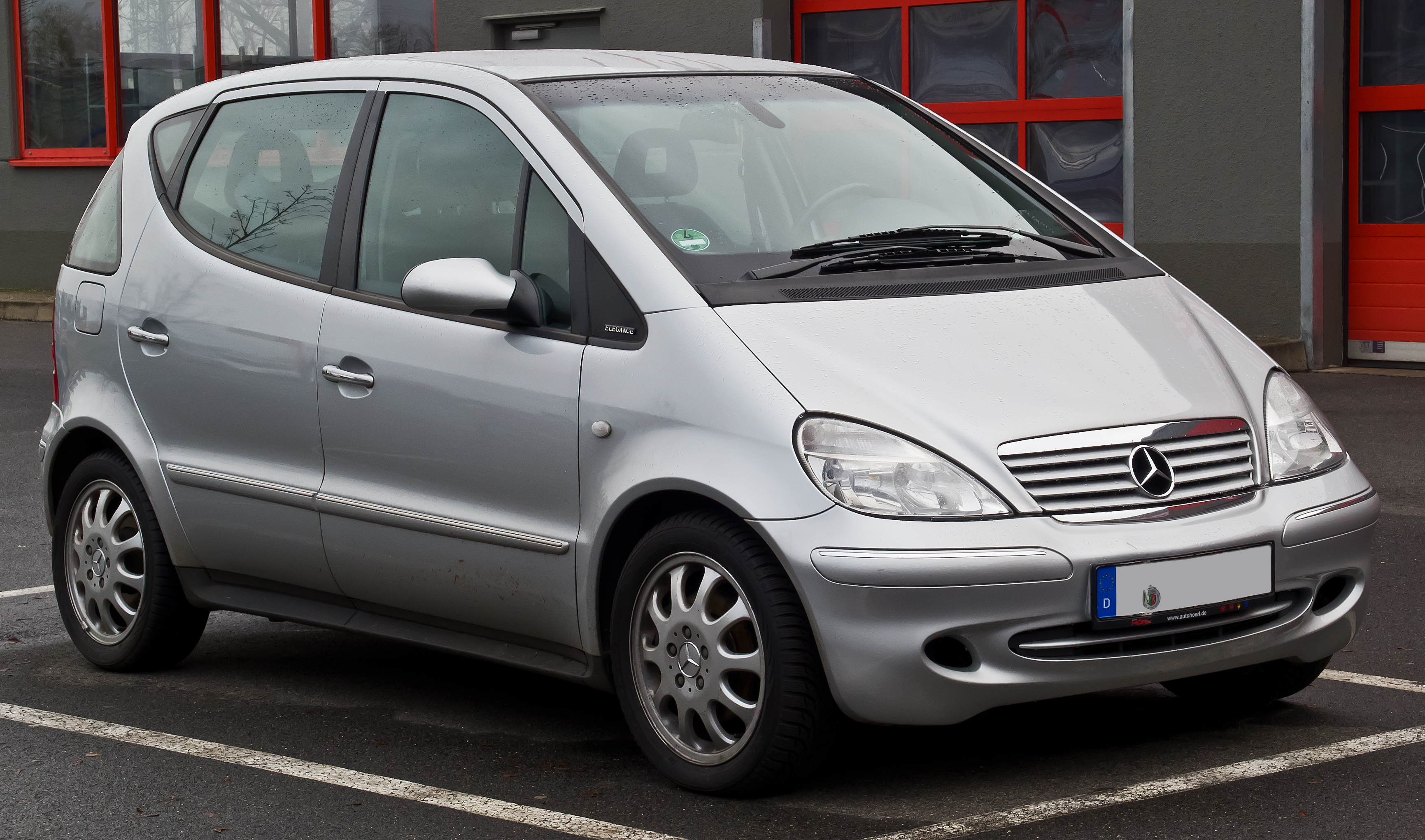 Mercedes-Benz A 190 L Elegance (V 168, Facelift)